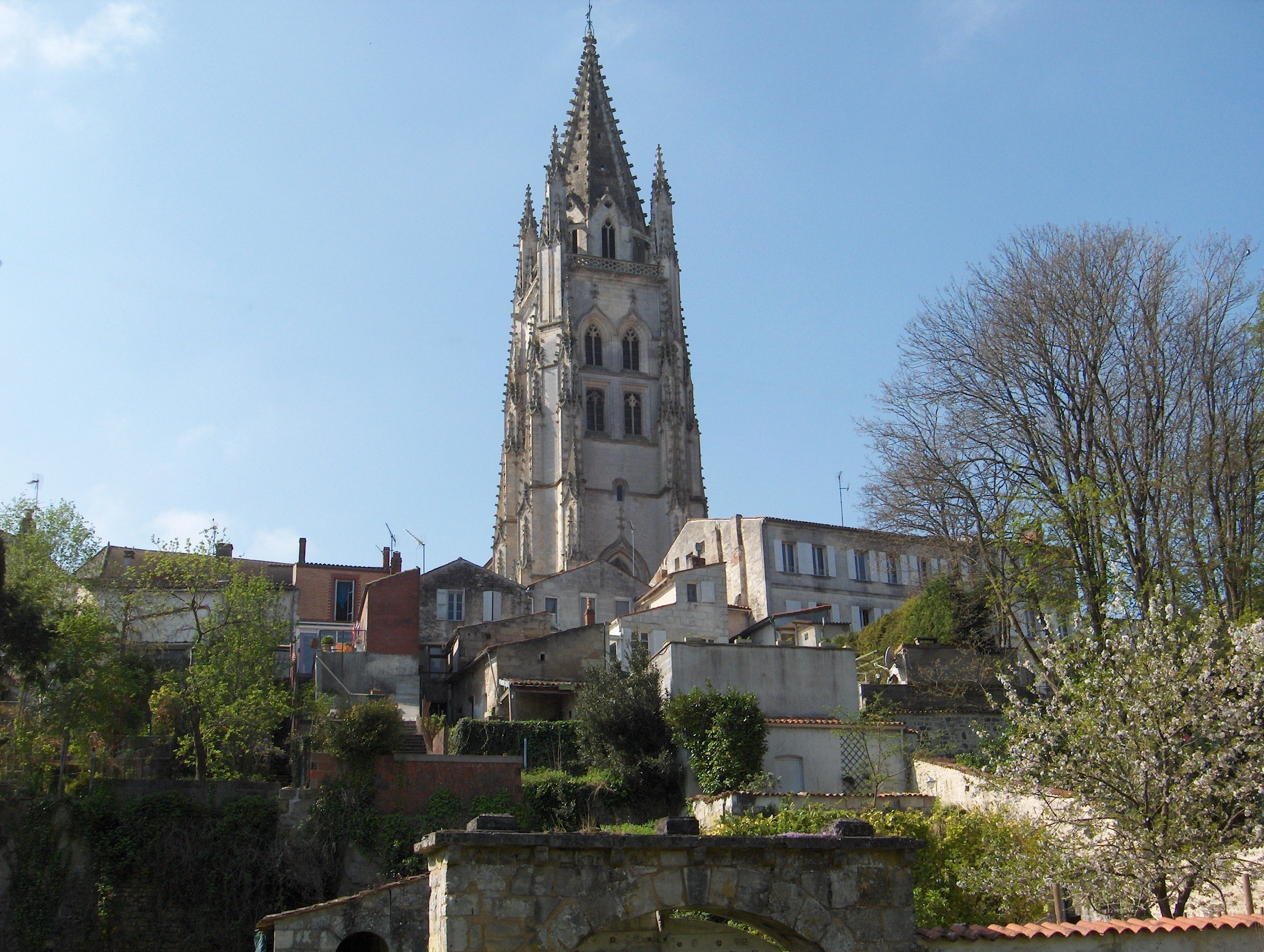 Eglise Saint-Eutrope de Saintes, Charente-Maritime, France